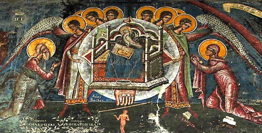 Külső falfestmény a humori kolostor falán (Románia)